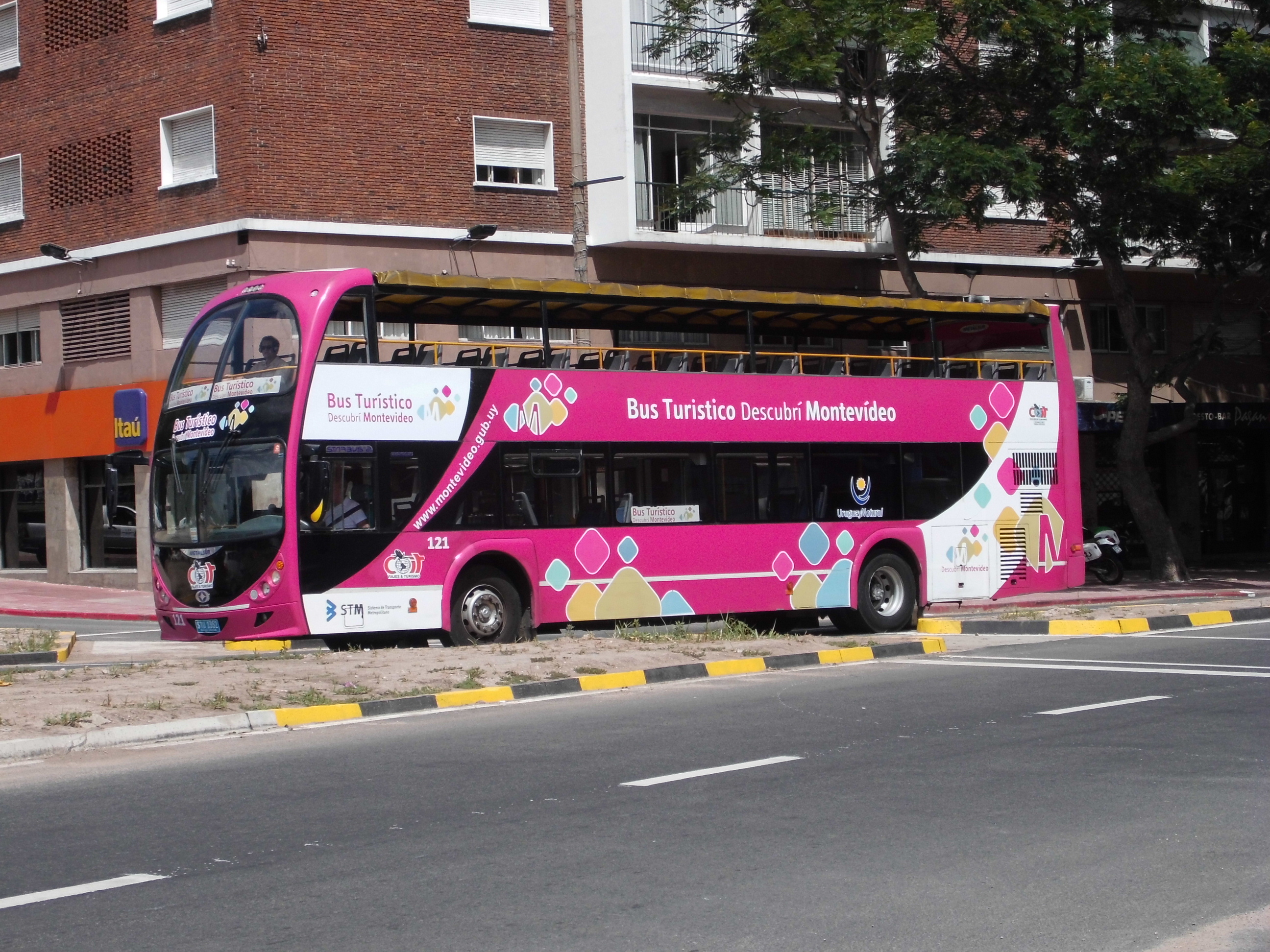 Ómnibus turístico de Montevideo circulando por Avenida del Libertador hacia la parada del Palacio Legislativo.